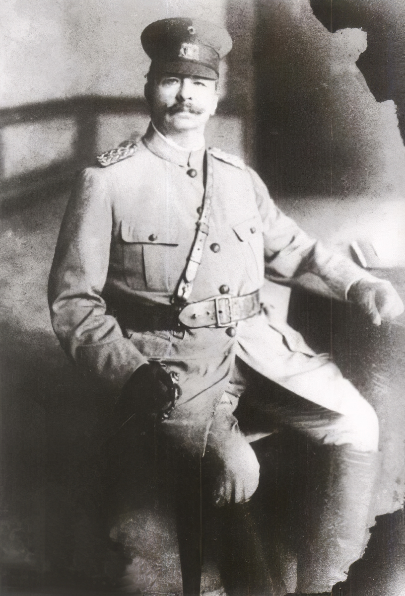 Juan Vicente Gómez in 1928.